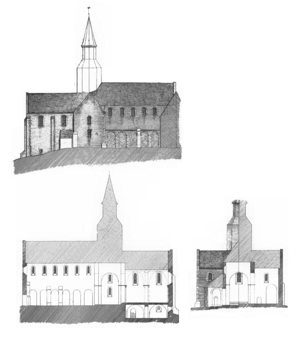 Elévation nord, coupe longitudinale depuis le sud et coupe transversale.